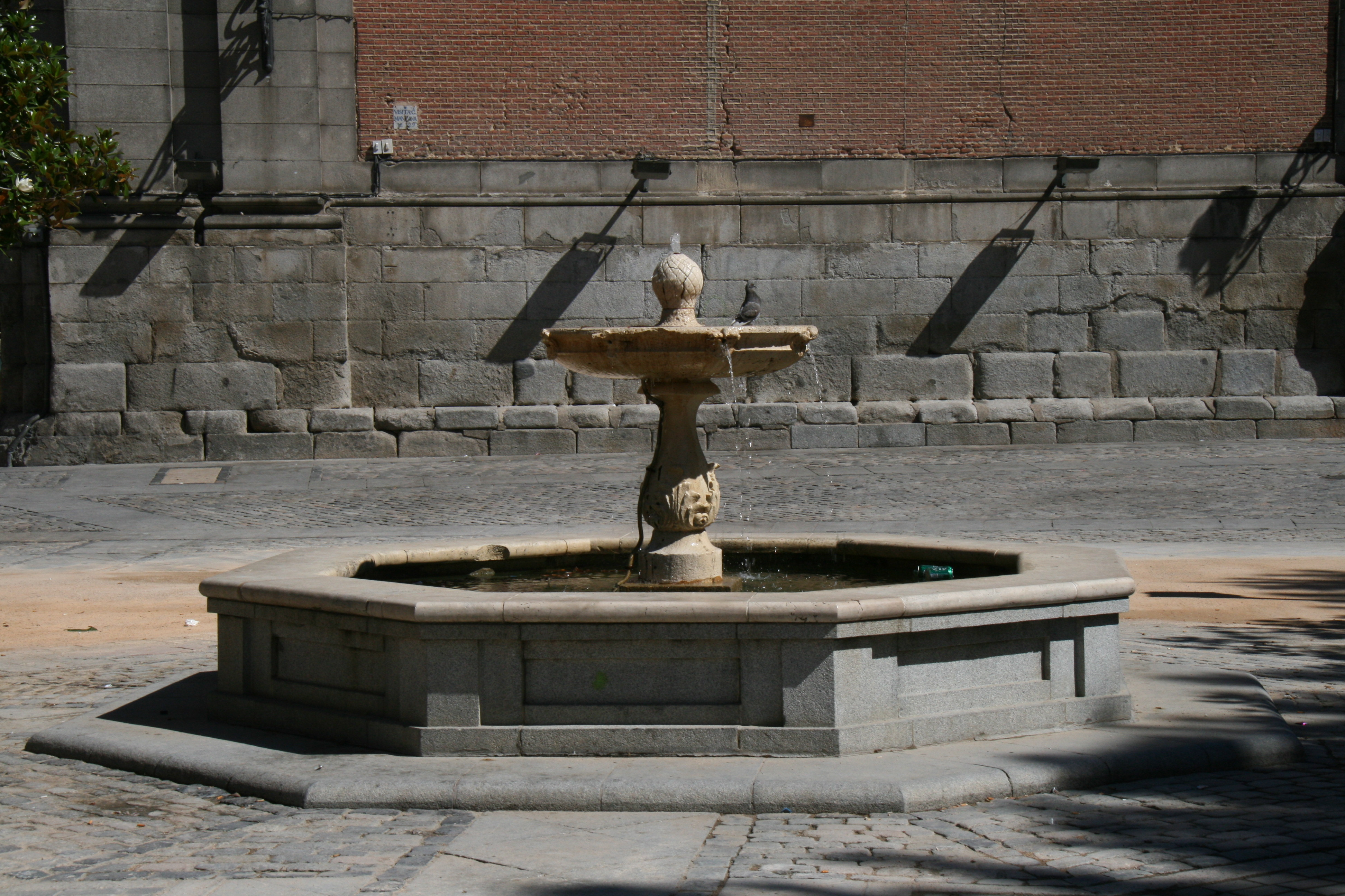 Pequeña fuente circular de la Alcachofa, en la plaza de los Carros. [1] y [2]